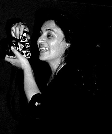 פסי גירש, צלמת ישראלית